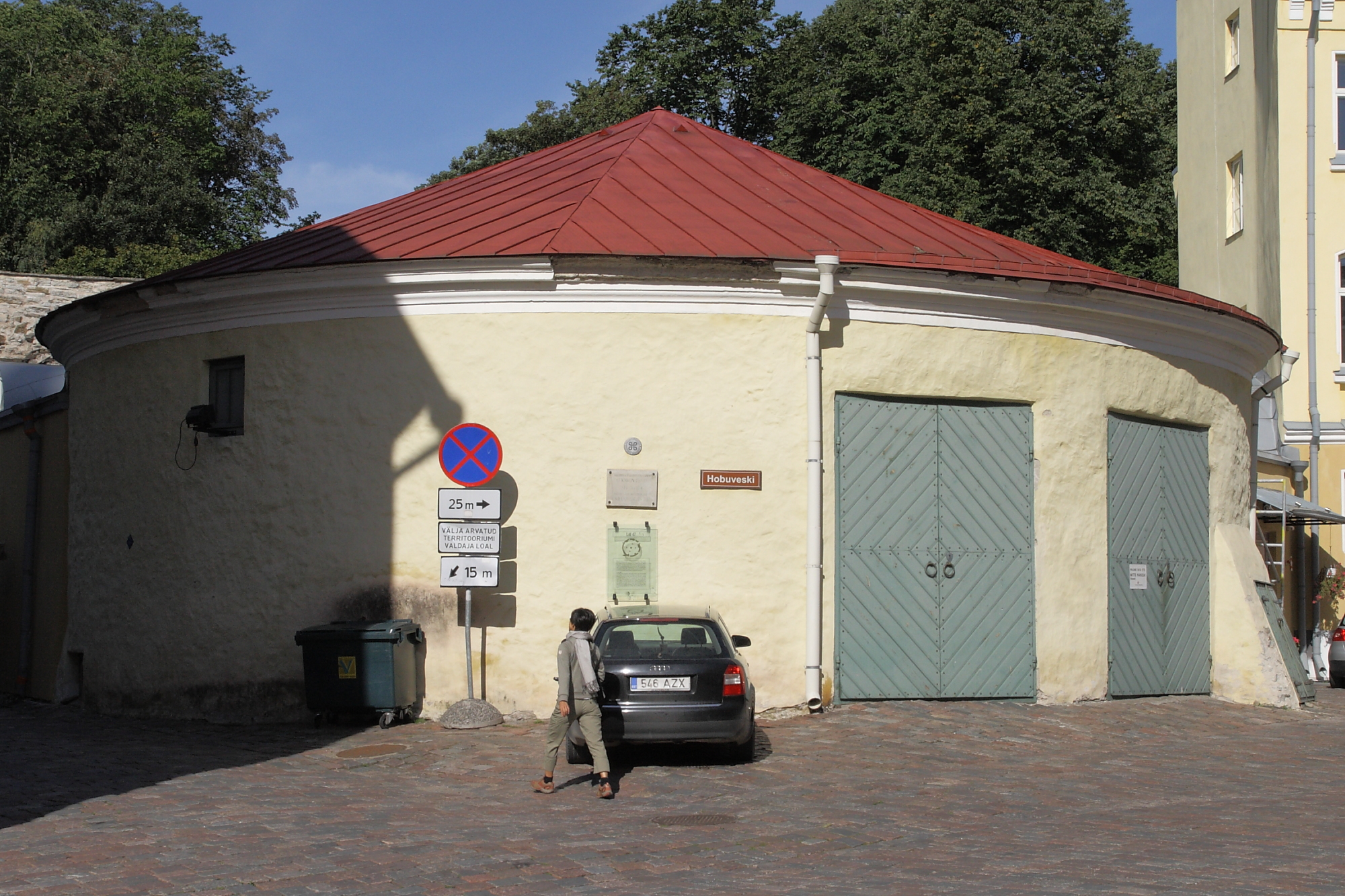 Tallinna hobuveski, 14.-18.saj